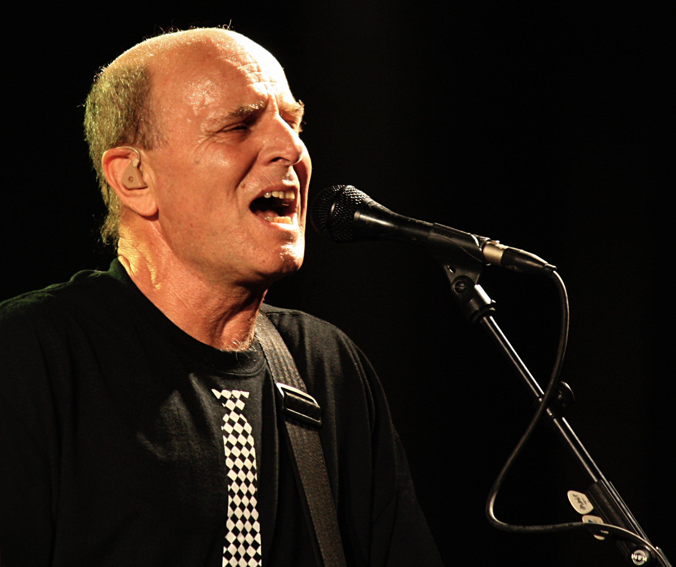 יושי שדה בהופעה של תיסלם בחגיגות היין, סוכות 2013, ראשון לציון.